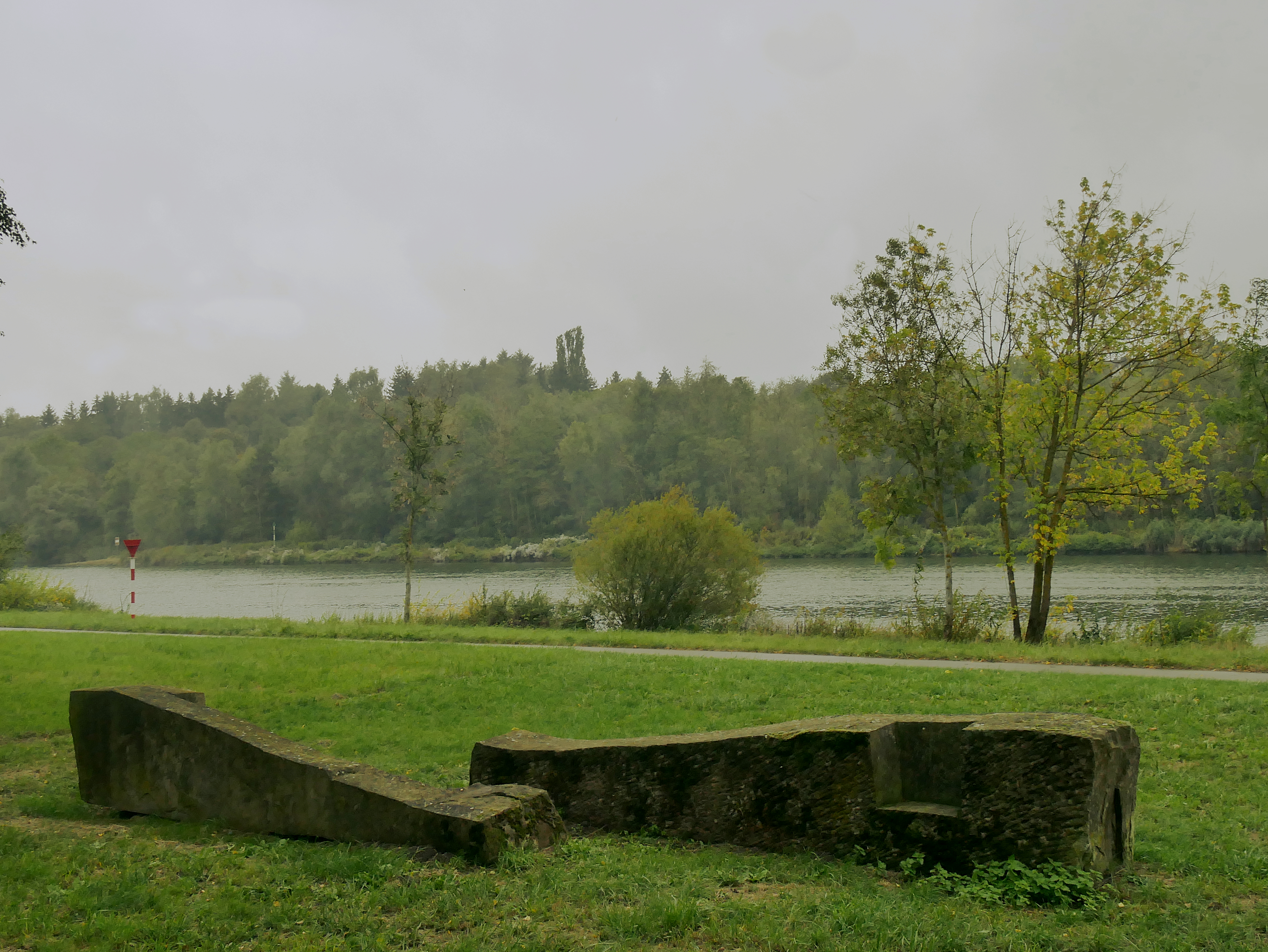 Die Skulptur trägt den Titel "Zwei Wellen". Breit gelagert ruhen die beiden Steine nebeneinander und laden den Besucher zum Sitzen und Ausruhen ein. Die Bank oder der einzelne Sitz sind nicht bloße Form, sondern auch durchdachte Funktion.